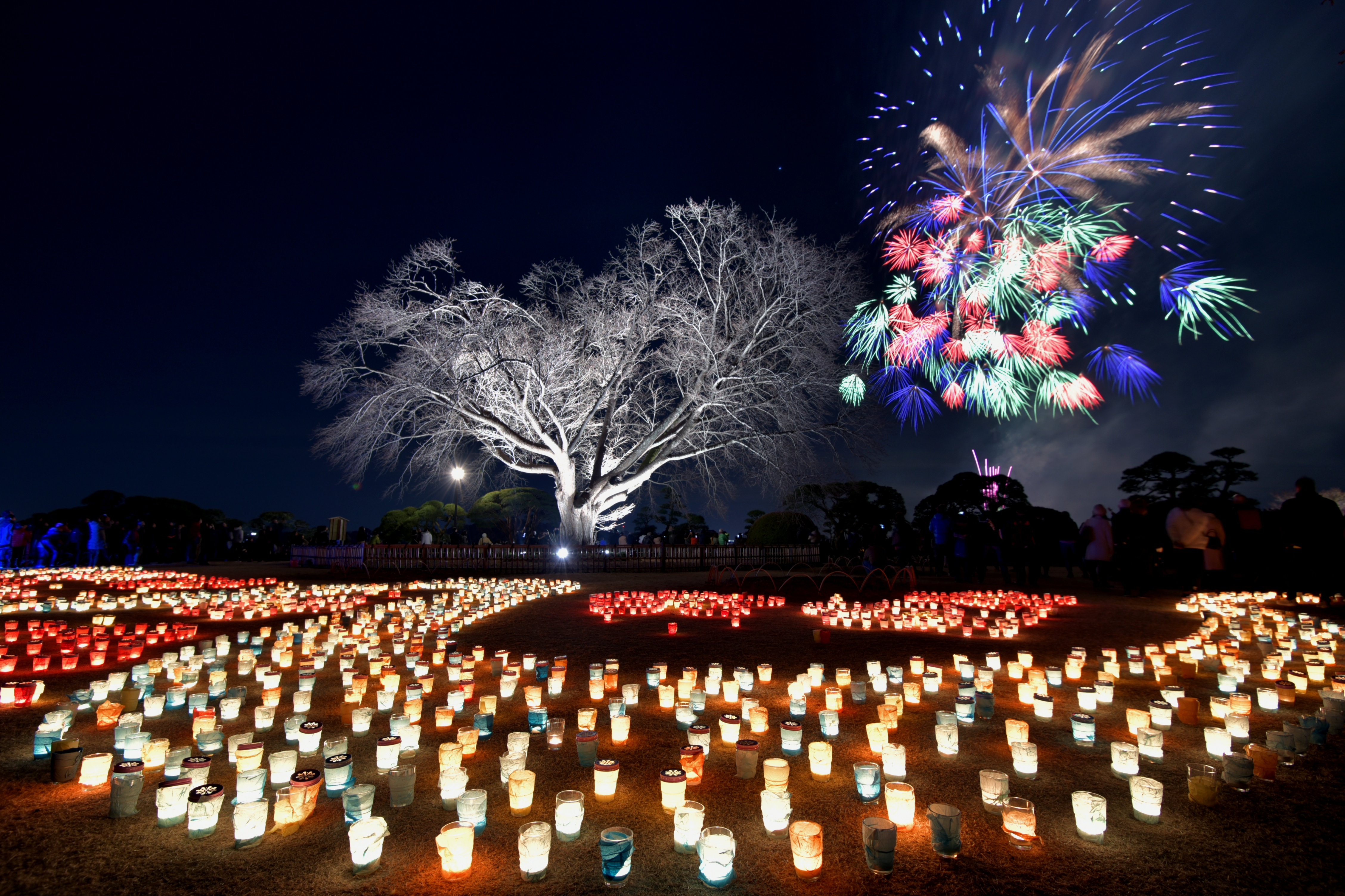 2019年・夜梅祭 第二夜（偕楽園）のキャンドルライトとフィナーレを飾る打ち上げ花火 Nikon D750